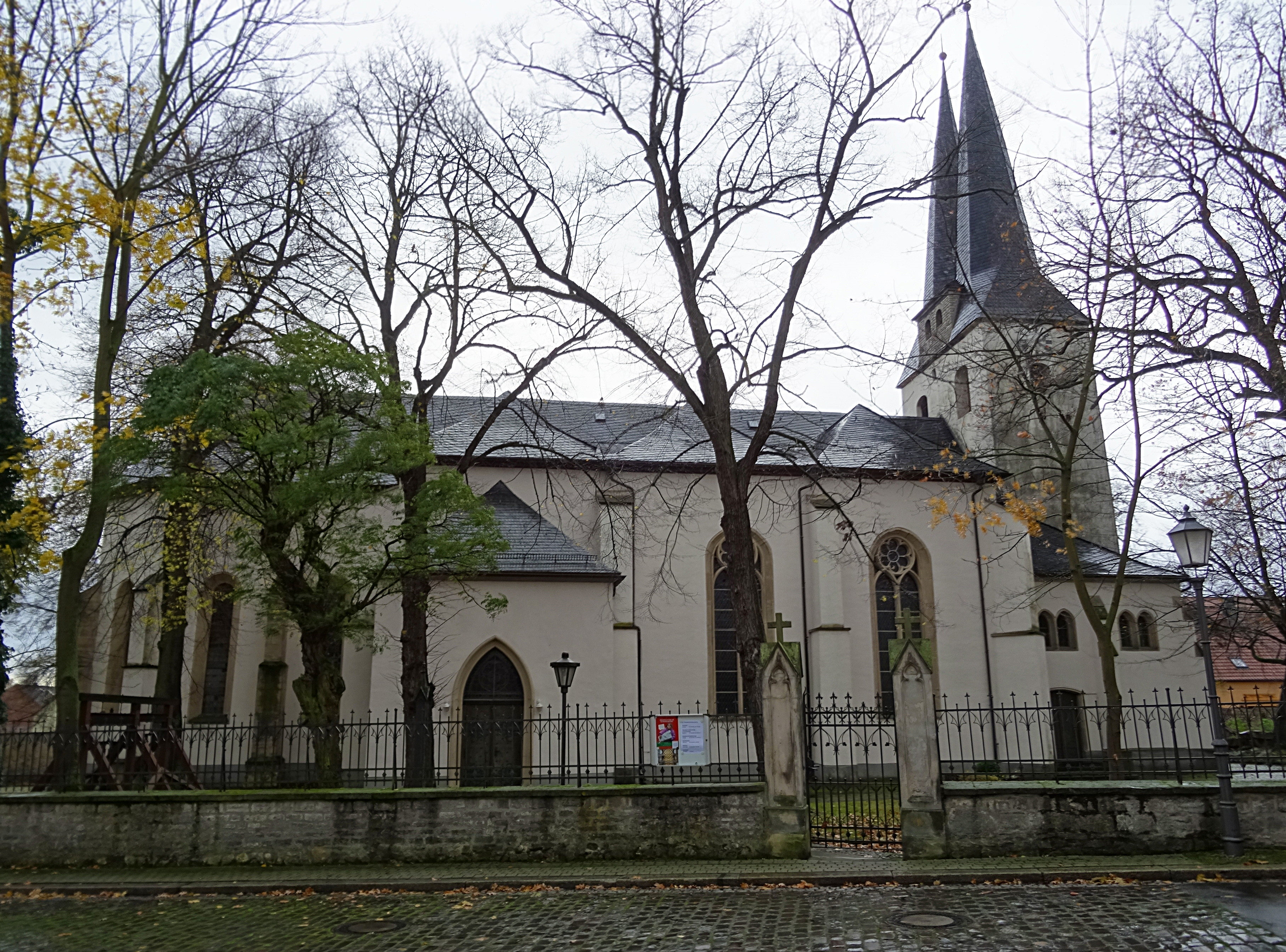 Stadtkirche St. Jacobi (Wanzleben), Ansicht von Norden